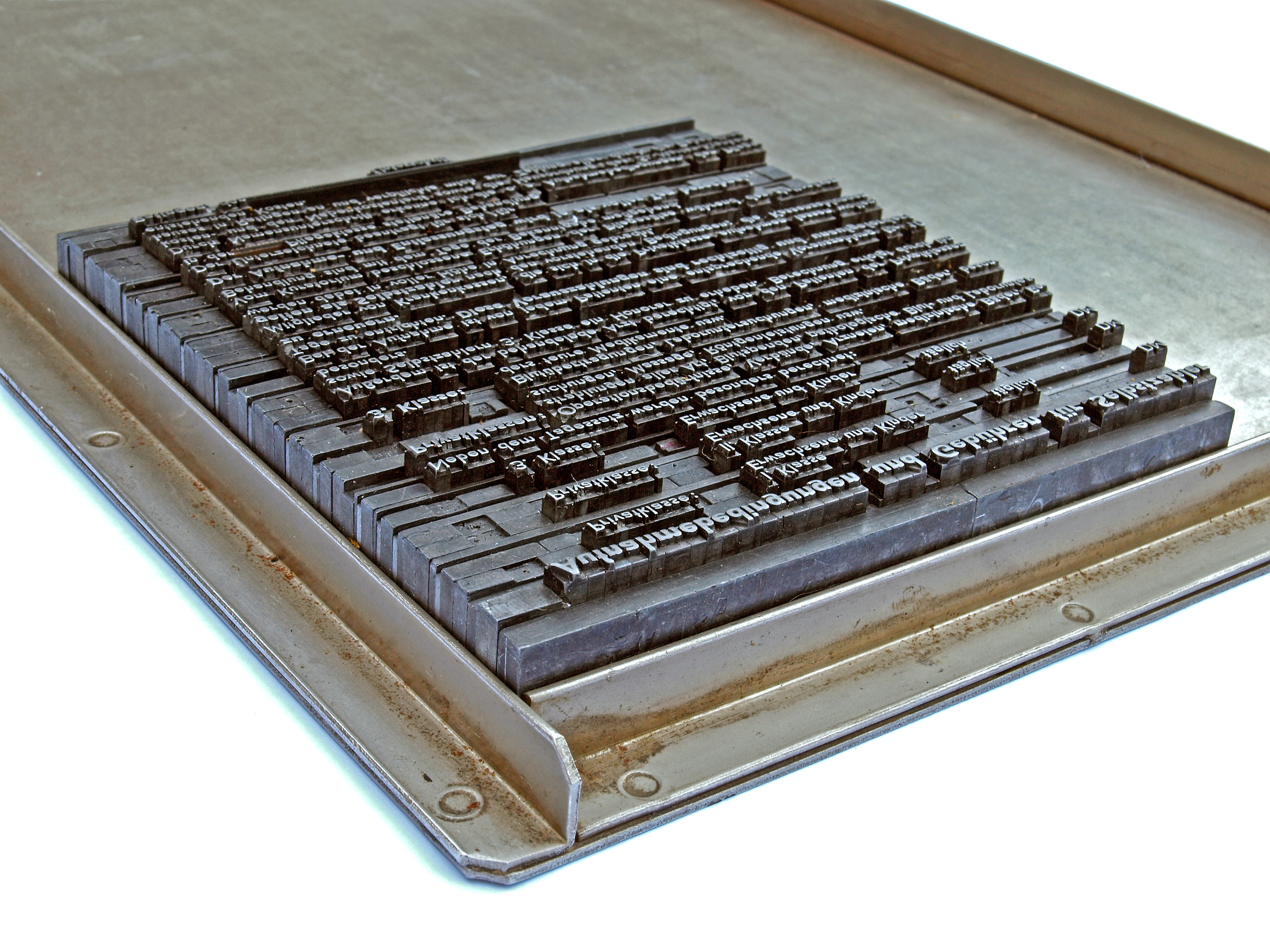 Handsatz im Setzschiff